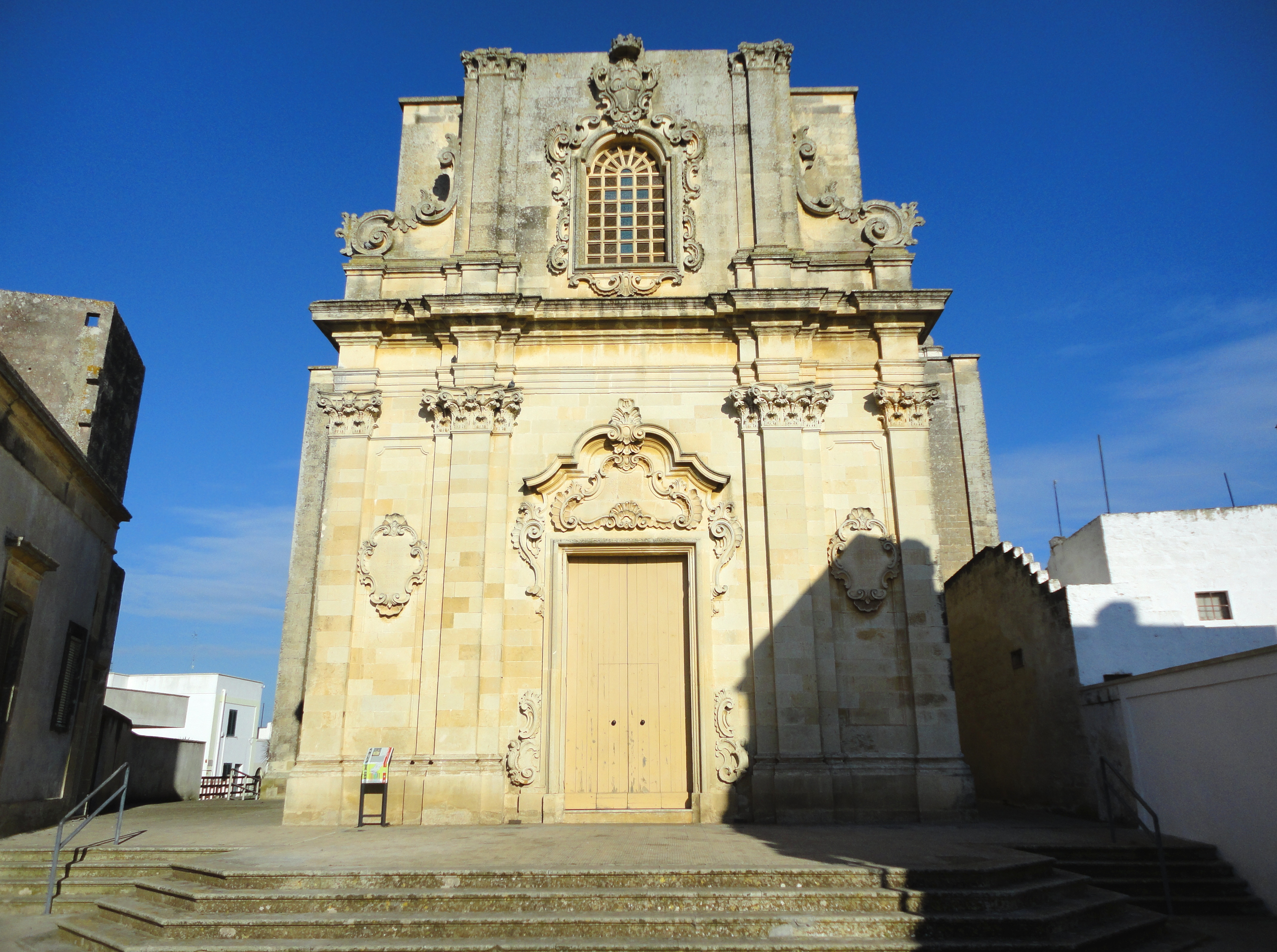 Chiesa Madre di Giuggianello, Lecce